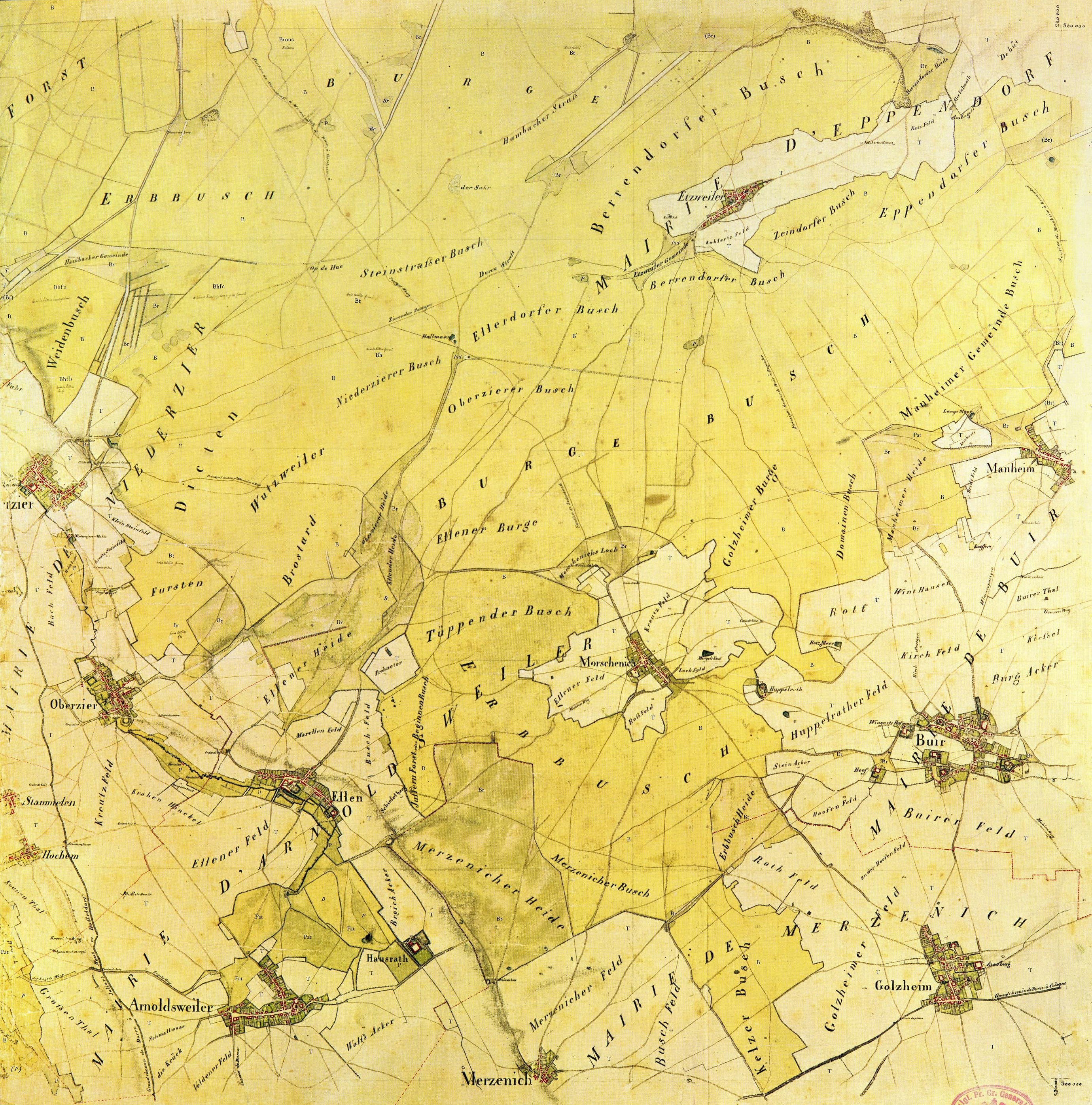 Kartenaufnahme der Rheinlande durch Tranchot und von Müffling vorkommende Orte: * Arnoldsweiler * Buir * Ellen * Etzweiler * Golzheim * Hausrath * Hochem * Huppelrath * Manheim * Merzenich * Morschenich * Oberzier * Stammelen